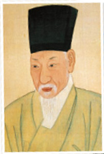 윤증 영정